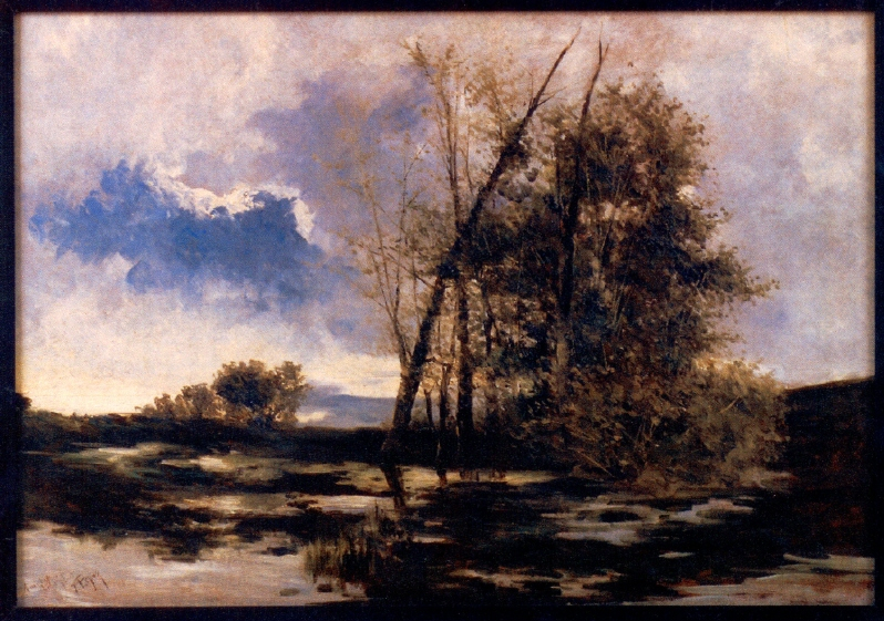 Pintura (1875 - 1899) de Juan Espina y Capó conservada al Museu d'Art Jaume Morera de Lleida. Dipòsit del Museo del Prado